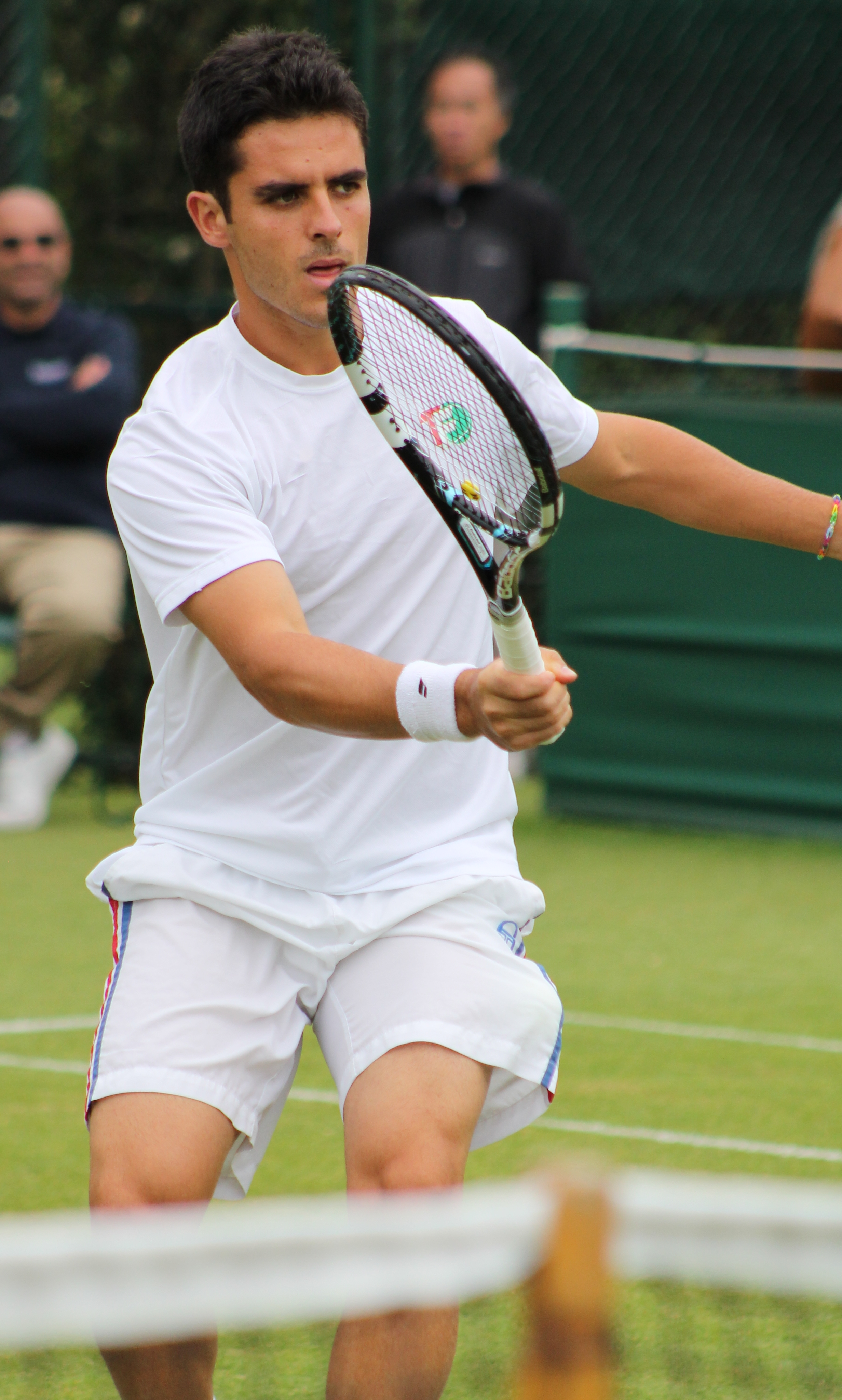 Fabbiano WMQ14 (4)